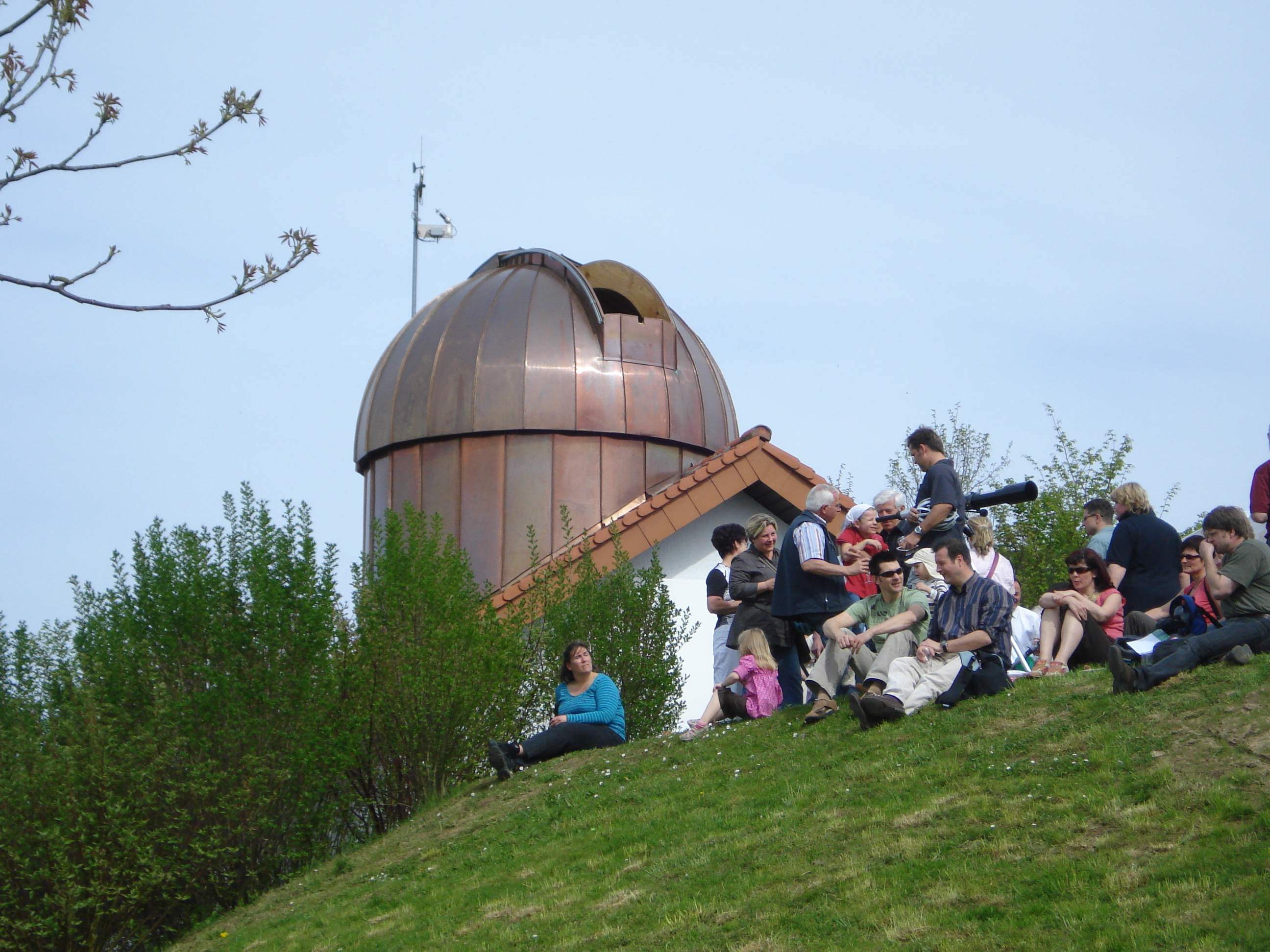 Sternwarte in March, Deutschland.